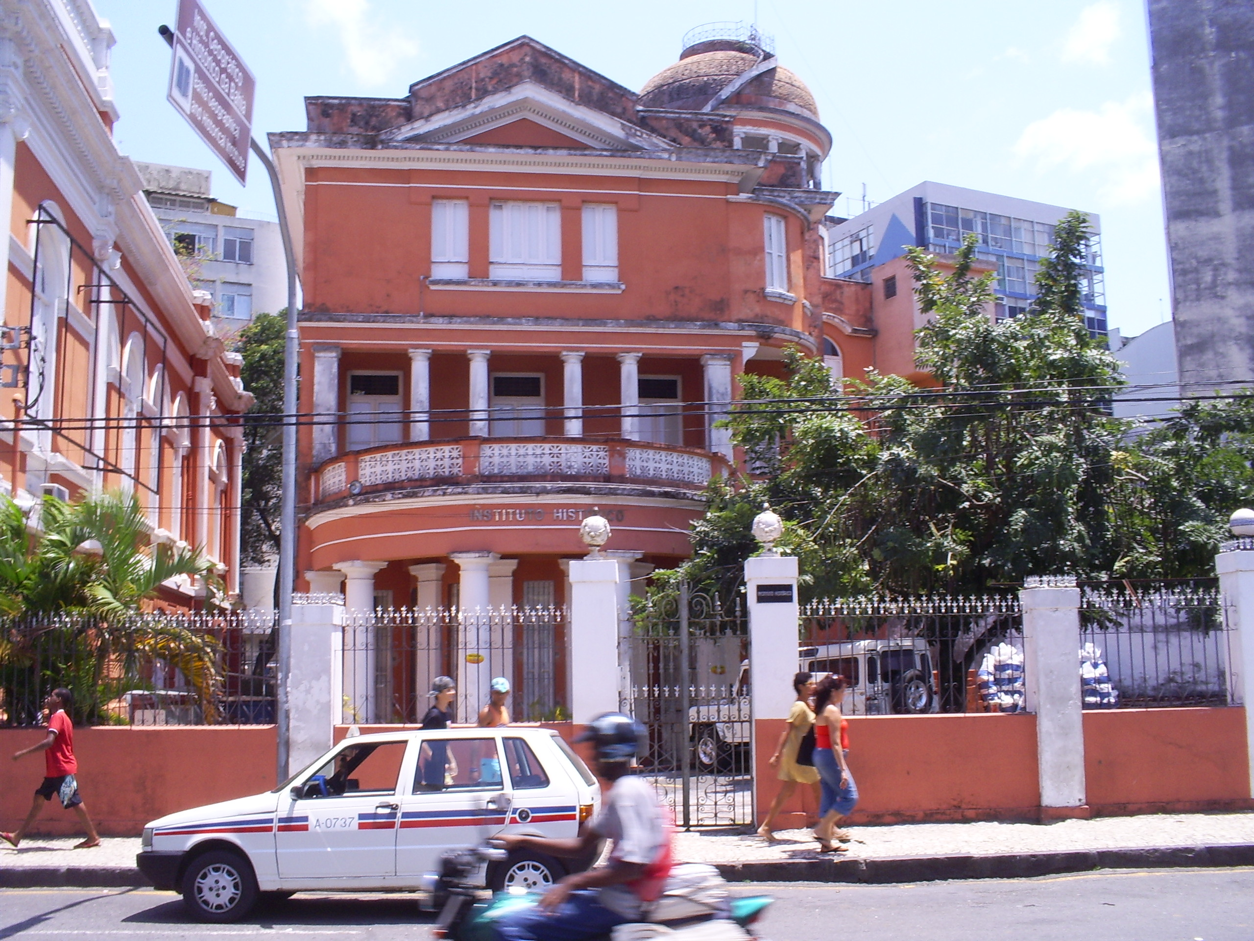 Foto do Instituto Histórico e Geográfico da Bahia, Salvador, Bahia, Brasil.